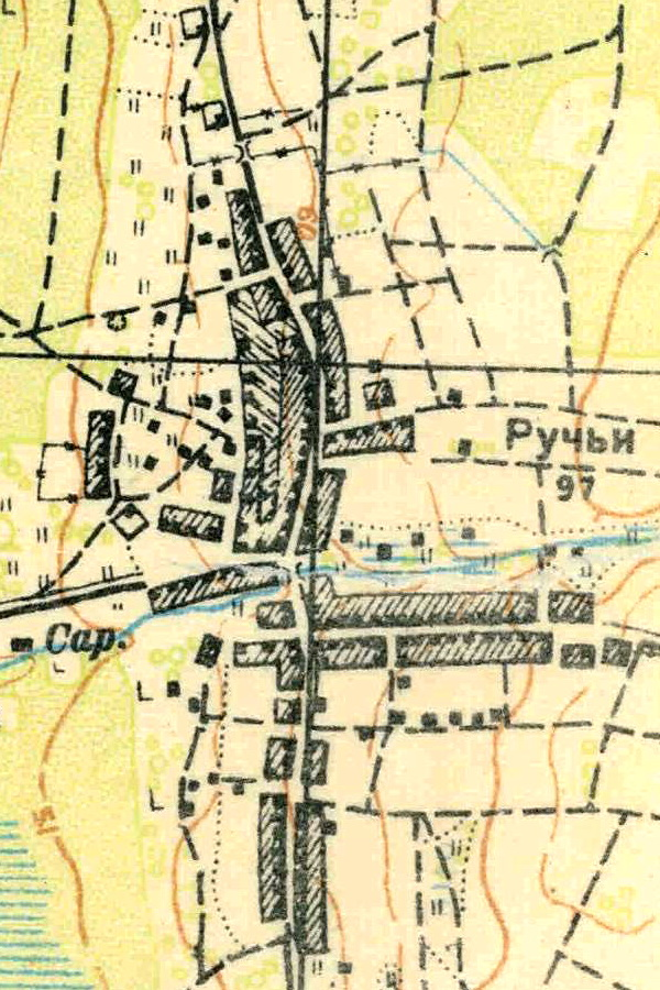 Топографическая карта Ленинградской области, квадрат О-35-9-Г-б (Вистина), деревня Ручьи